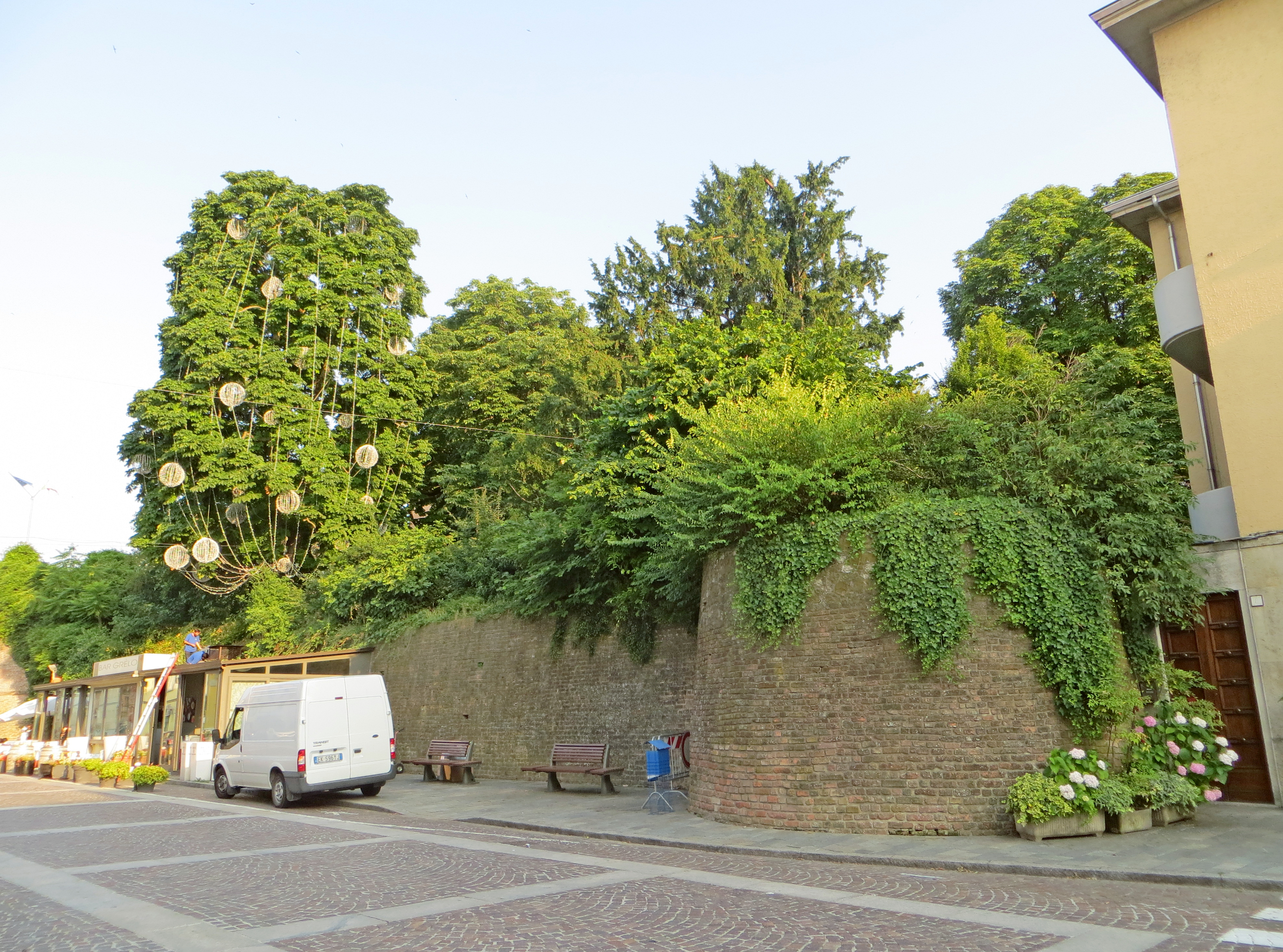 Rocca dei Sanvitale (Noceto) - torre angolare nord-ovest e lato nord